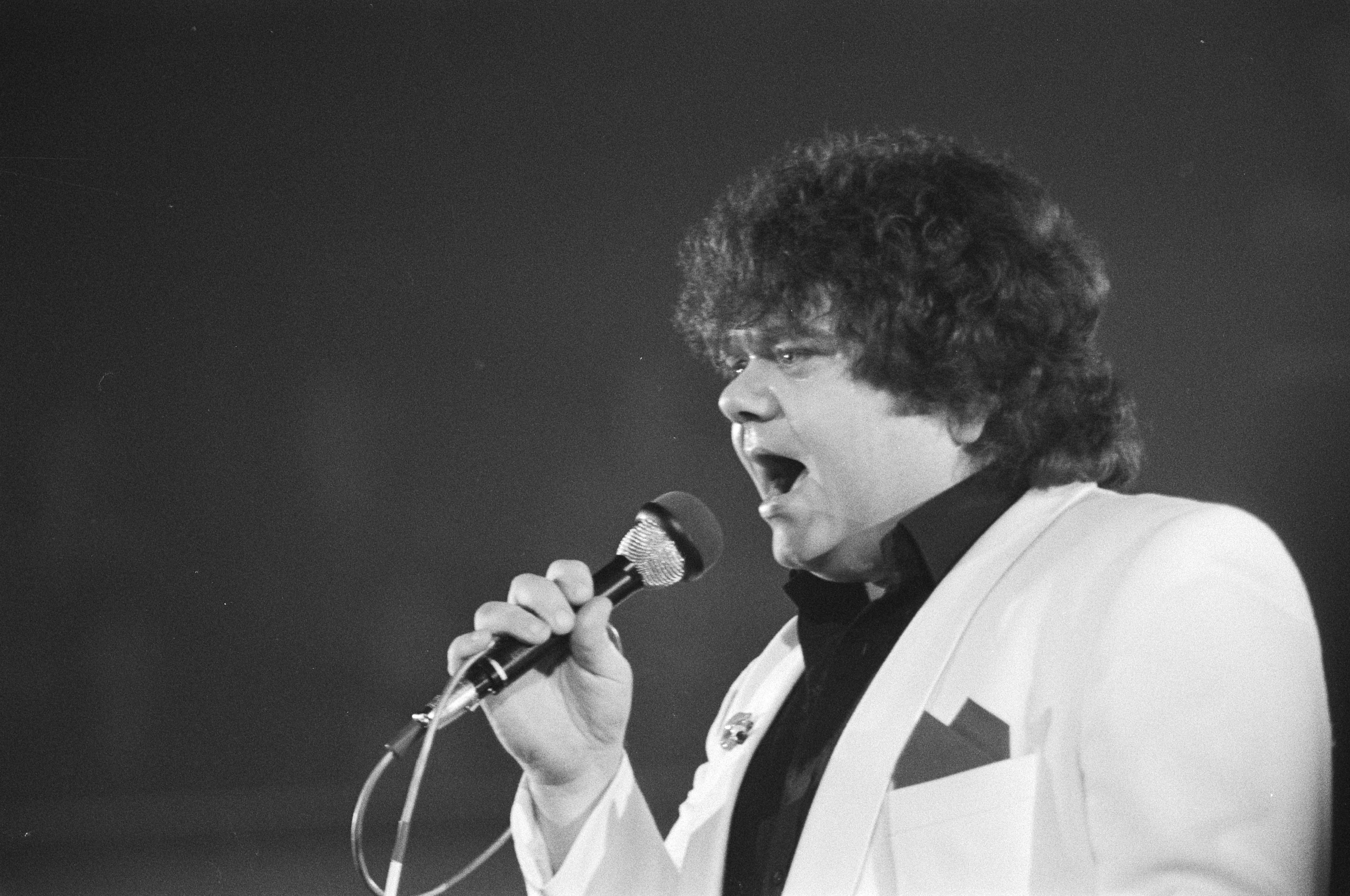 Collectie / Archief : Fotocollectie Anefo Reportage / Serie : [ onbekend ] Beschrijving : Opnamen in Flint in Amersfoort van programma over zanger Andre Hazes dat de TROS 26 maart aanstaande uitzendt. Andre Hazes zingend Datum : 5 februari 1982 Locatie : Amersfoort Trefwoorden : OPNAMEN, PROGRAMMAS, zangers Persoonsnaam : Hazes, André Instellingsnaam : TROS Fotograaf : Dijk, Hans van / Anefo Auteursrechthebbende : Nationaal Archief Materiaalsoort : Negatief (zwart/wit) Nummer archiefinventaris : bekijk toegang 2.24.01.05 Bestanddeelnummer : 931-9555